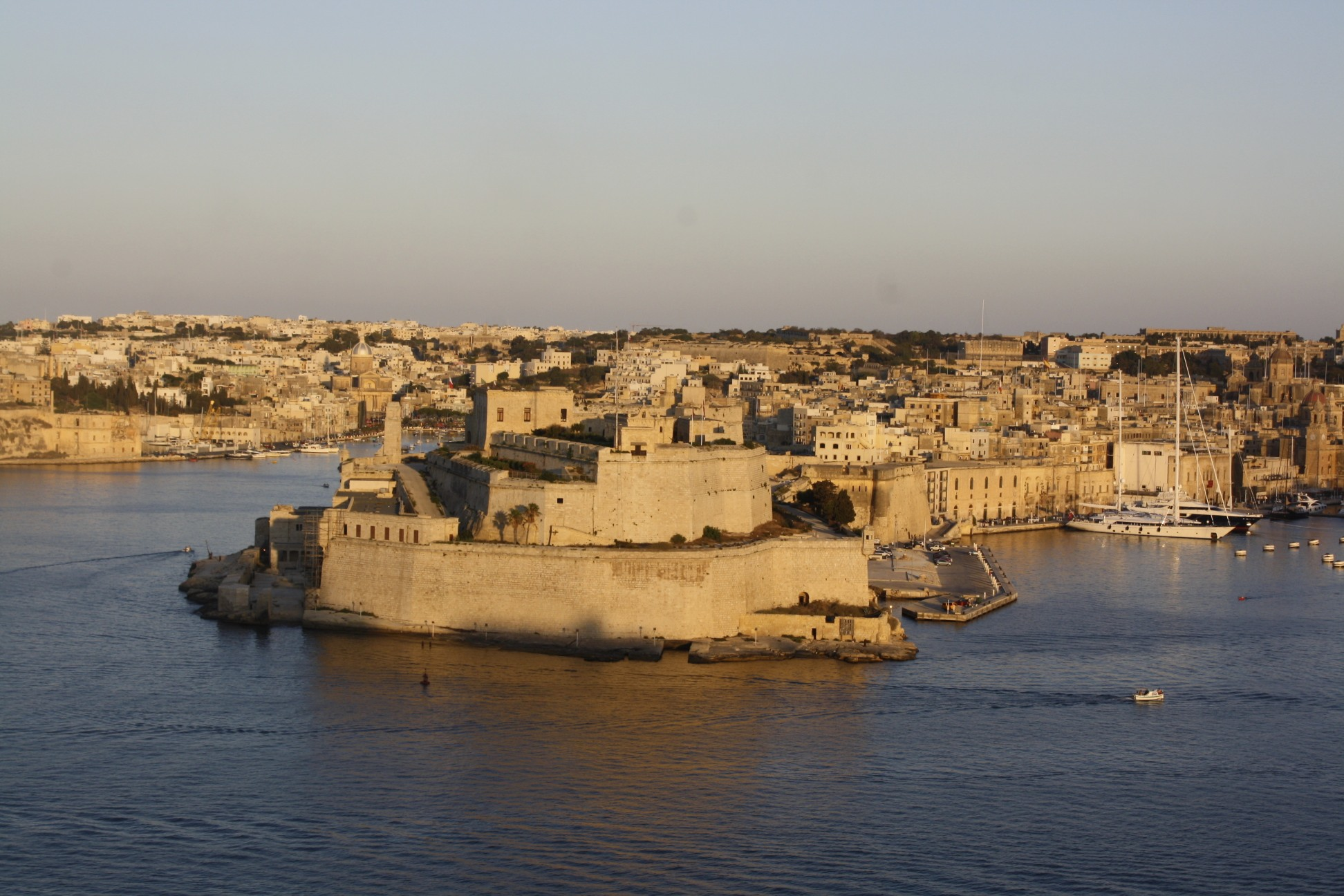 Fort Saint-Angelo de La Valette au coucher du soleil.